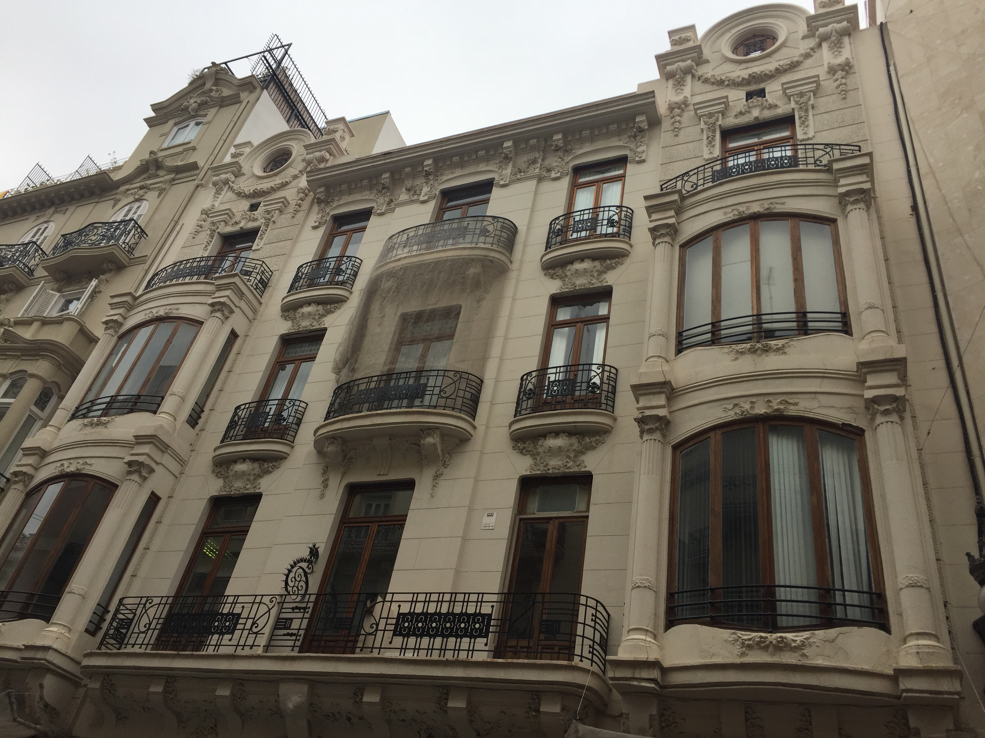 Obra de Goerlich en Valencia, casa Castelló, Grabador Esteve 12